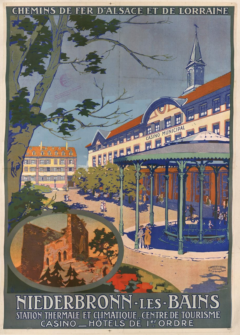 Chemins de fer d'Alsace et de Lorraine. Niederbronn-les-Bains : station thermale et climatique, centre de tourisme... / d'après R. Kister